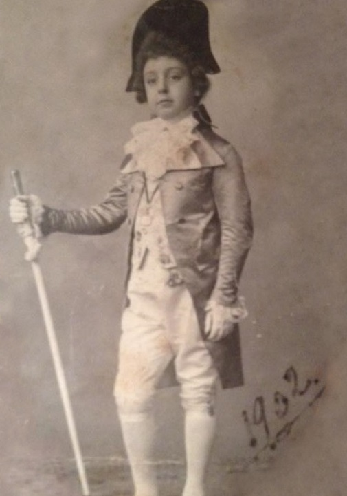 Retrato do 2º Visconde de Ximenez, datado 1902